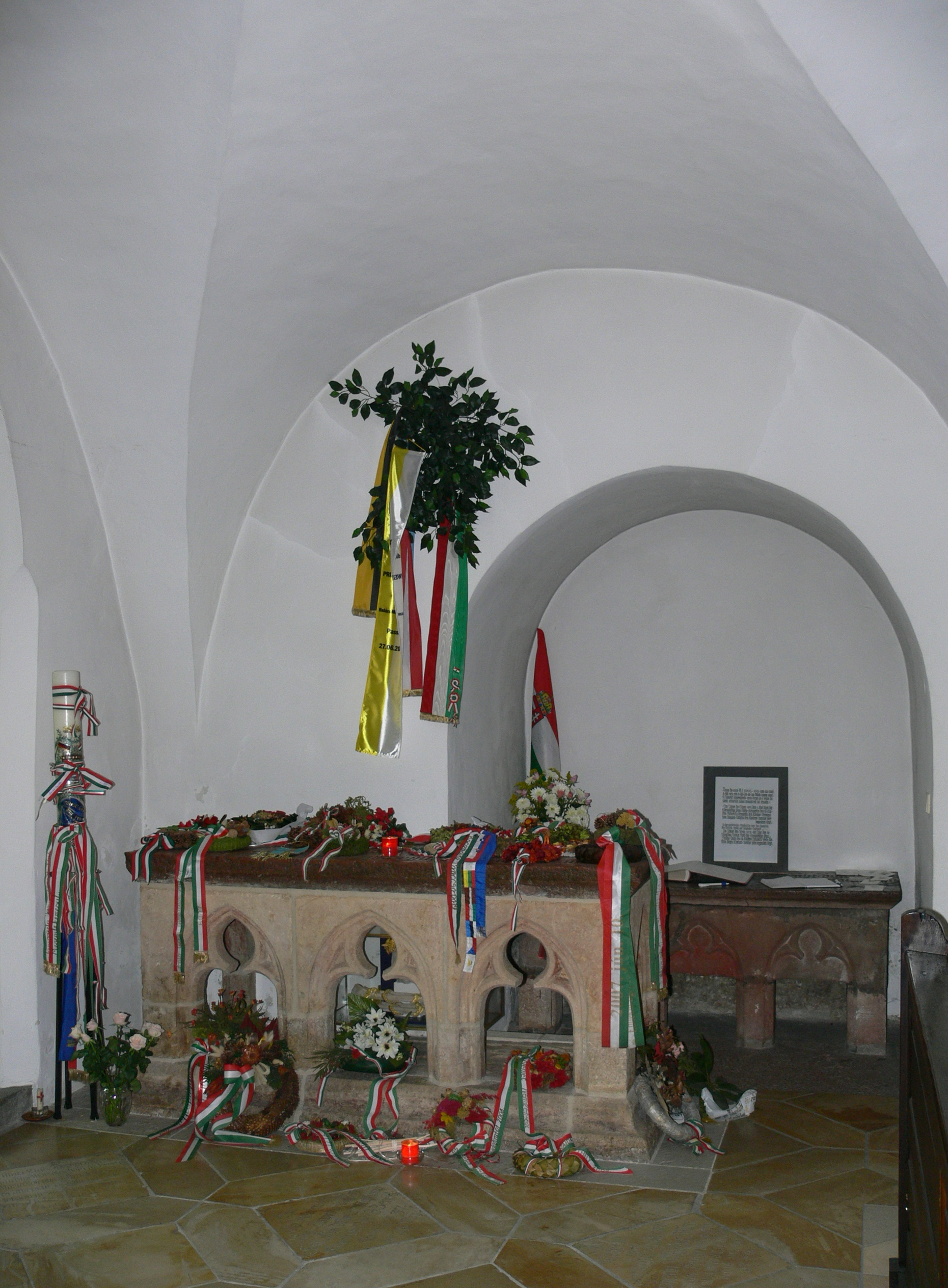 Passau, Kloster Niedernburg, Klosterkirche Grabmal der sel. Gisela, Königin von Ungarn, Gemahlin des hl. Stephan; um 1060